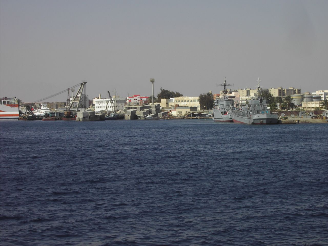 Digital StillCamera